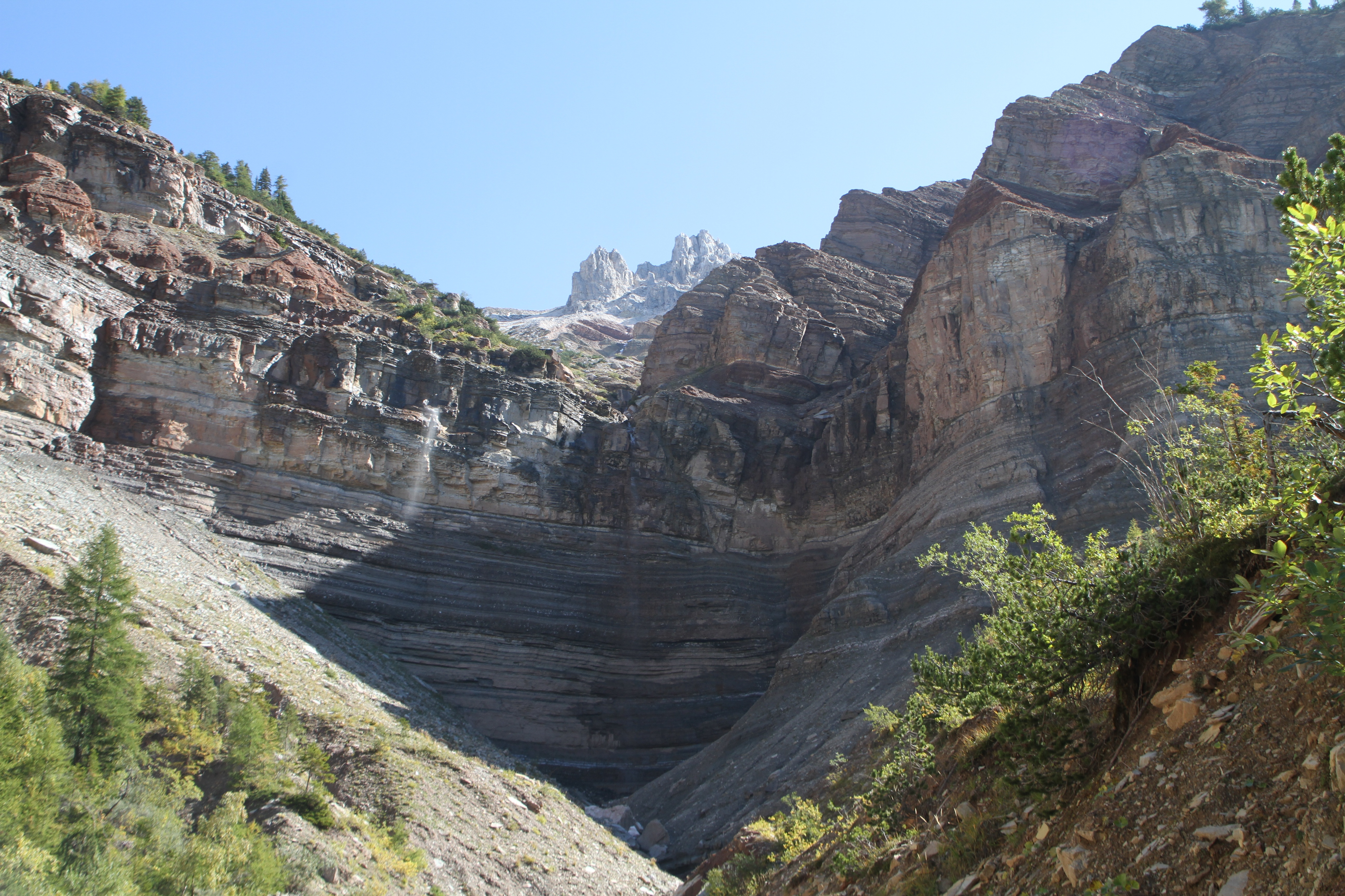 Aldein - Bletterbachschlucht - Talschluss in der Gorz